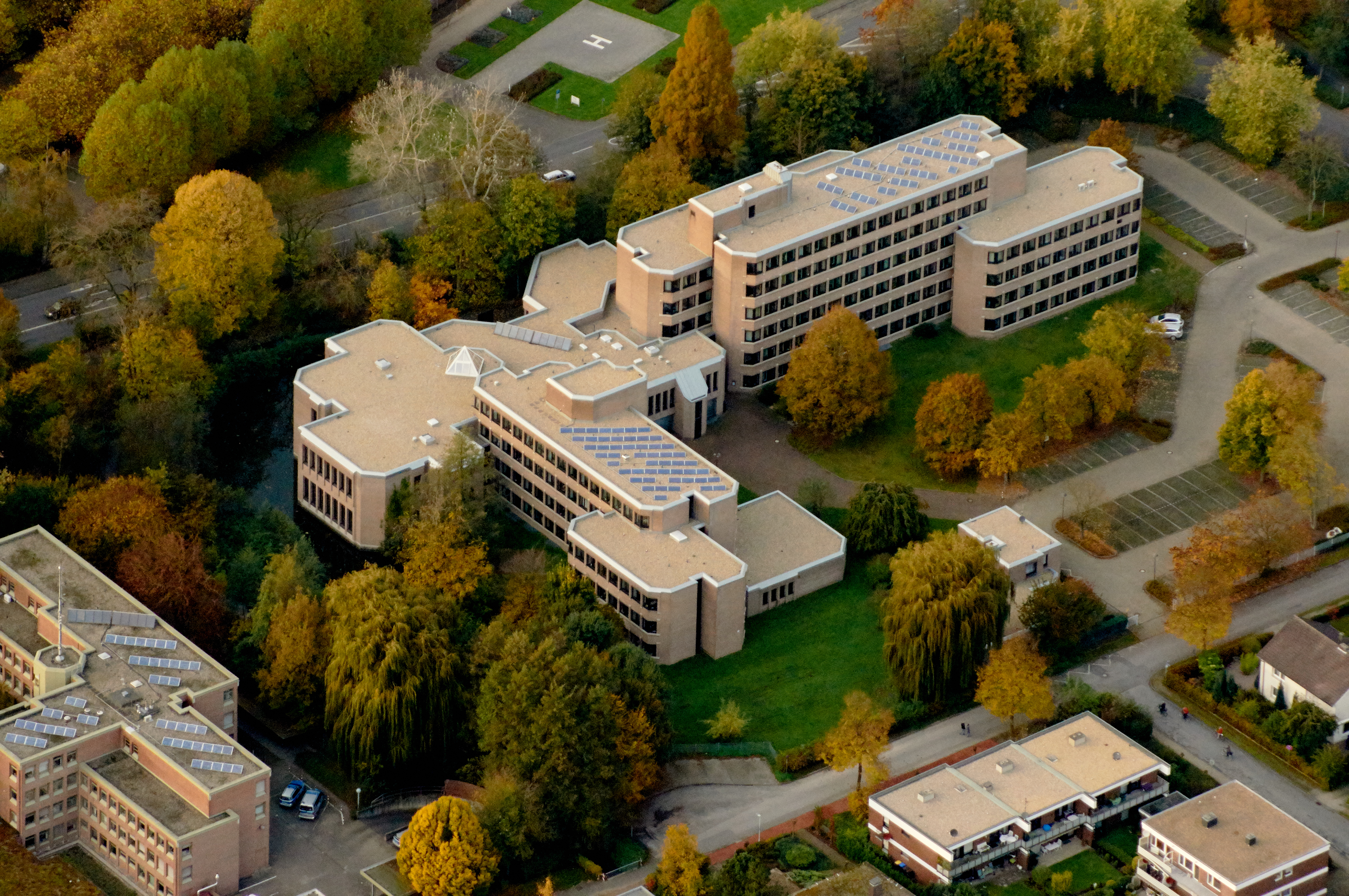 Amtsgericht und Finanzamt, Coesfeld. Nordrhein-Westfalen, Deutschland.